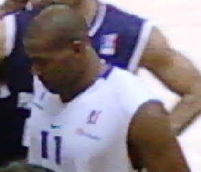 Lamont Hamilton lors du match Paris-Levallois - Dijon du 03 décembre 2011 au stade Pierre-de-Coubertin